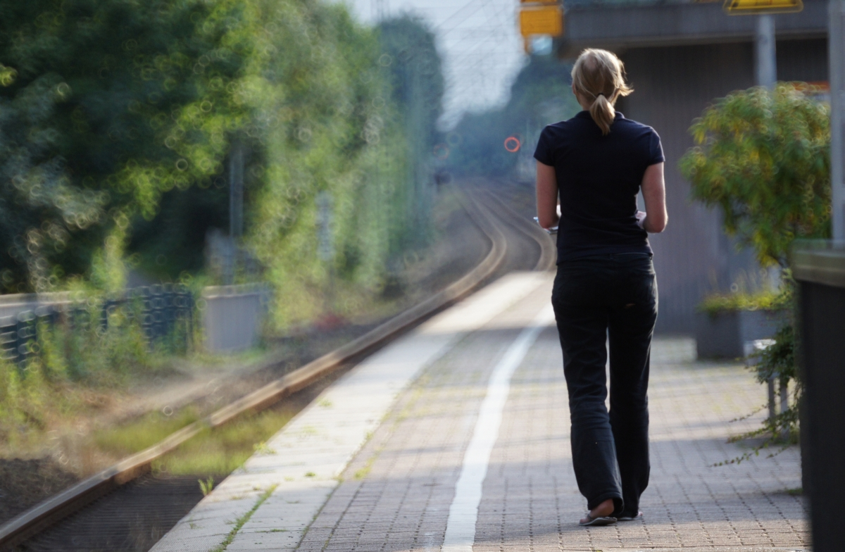 Schnappschuß mit Rokkor RF 5.6/250mm